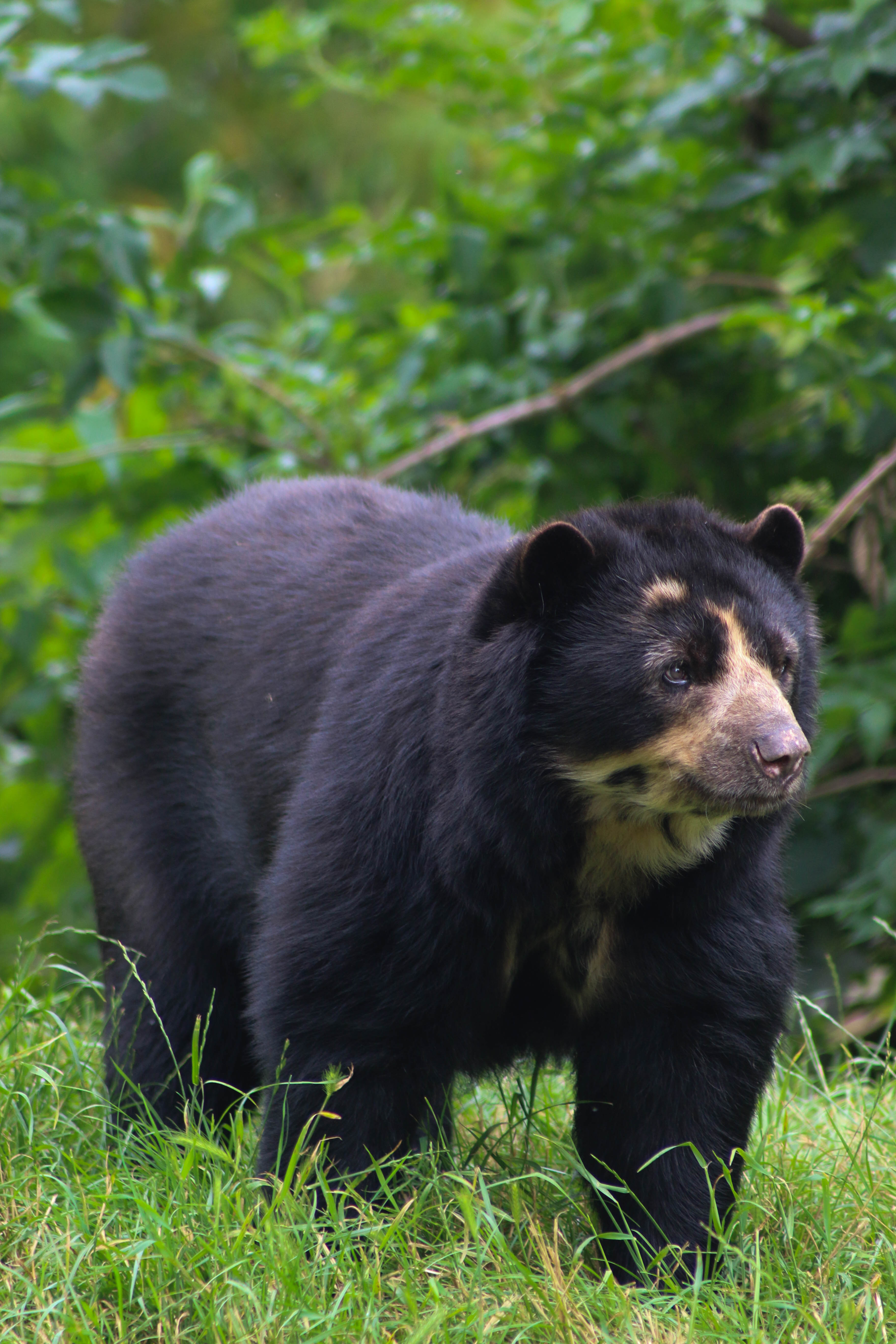 Ours à lunette au Bioparc de Doué-la-Fontaine